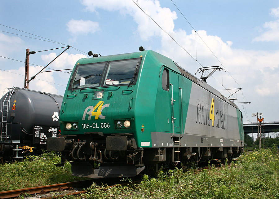 rail4chem 185-CL 006